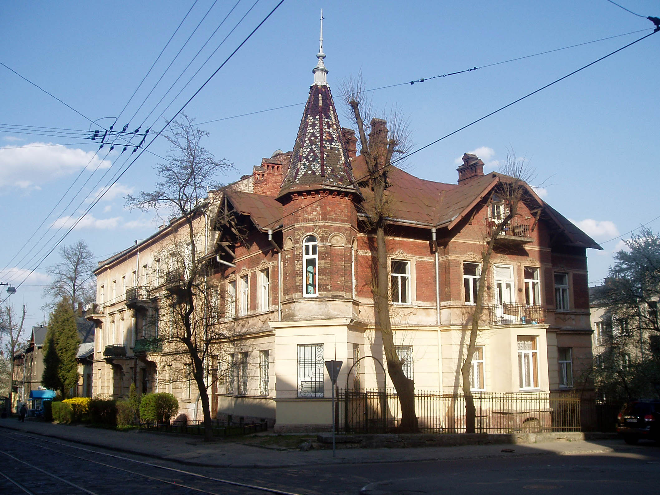 Власний будинок архітектора Міхала Ковальчука (1855—1938) на нинішній вулиці Генерала Чупринки у Львові. Споруджений у 1897—1898 роках.